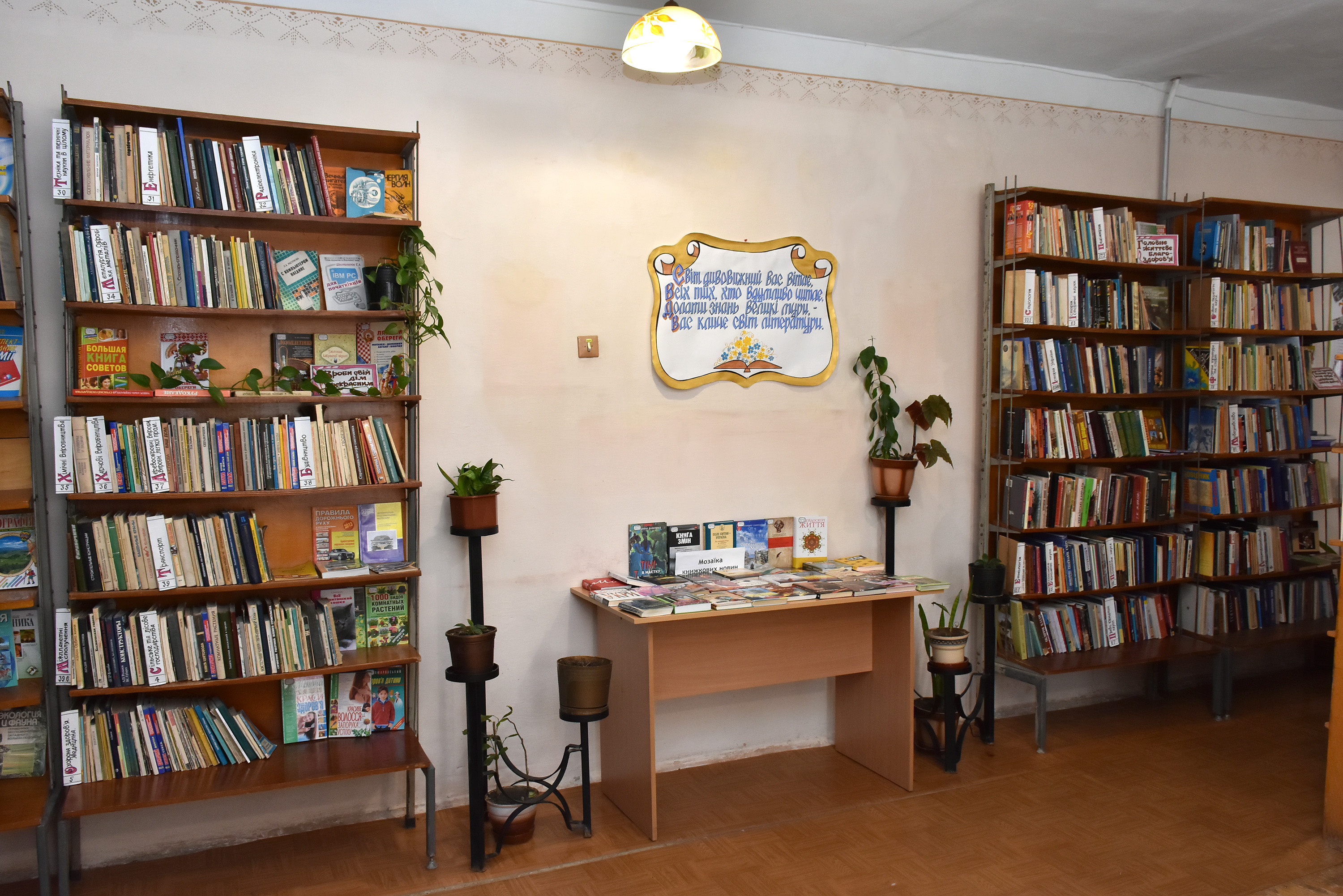 Бібліотека № 8 для дорослих Тернопільської міської централізованої бібліотечної системи.